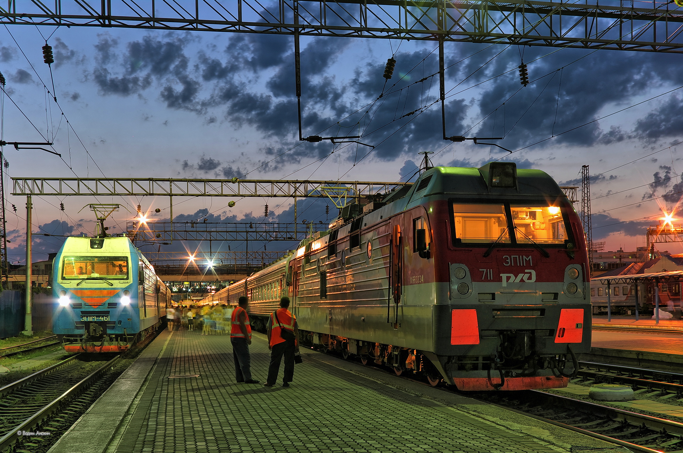 Электровозы ЭП1М-711 и ЭП1М-461 на станции Ростов-Главный